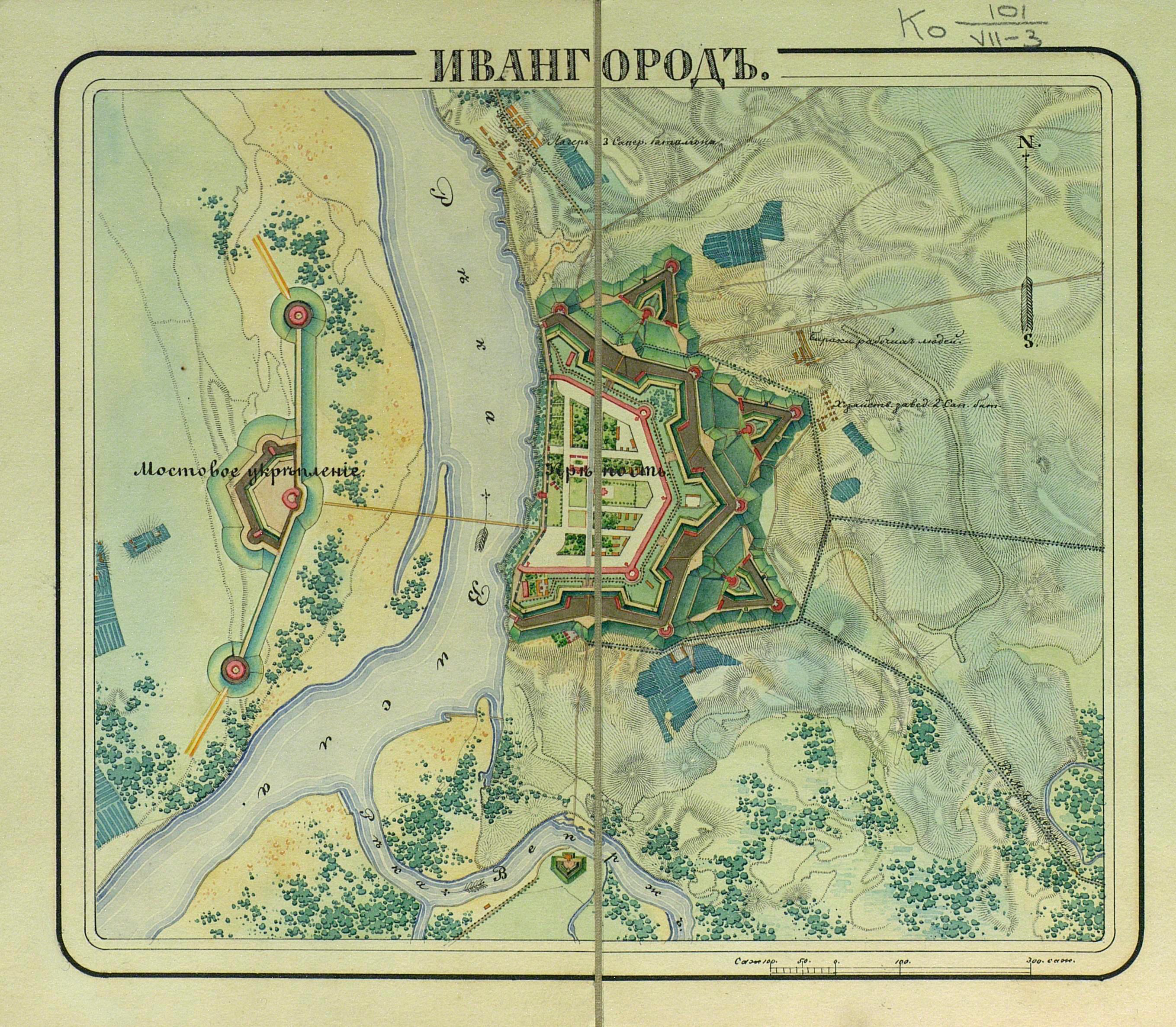 из "Атласа крепостей Российской империи".